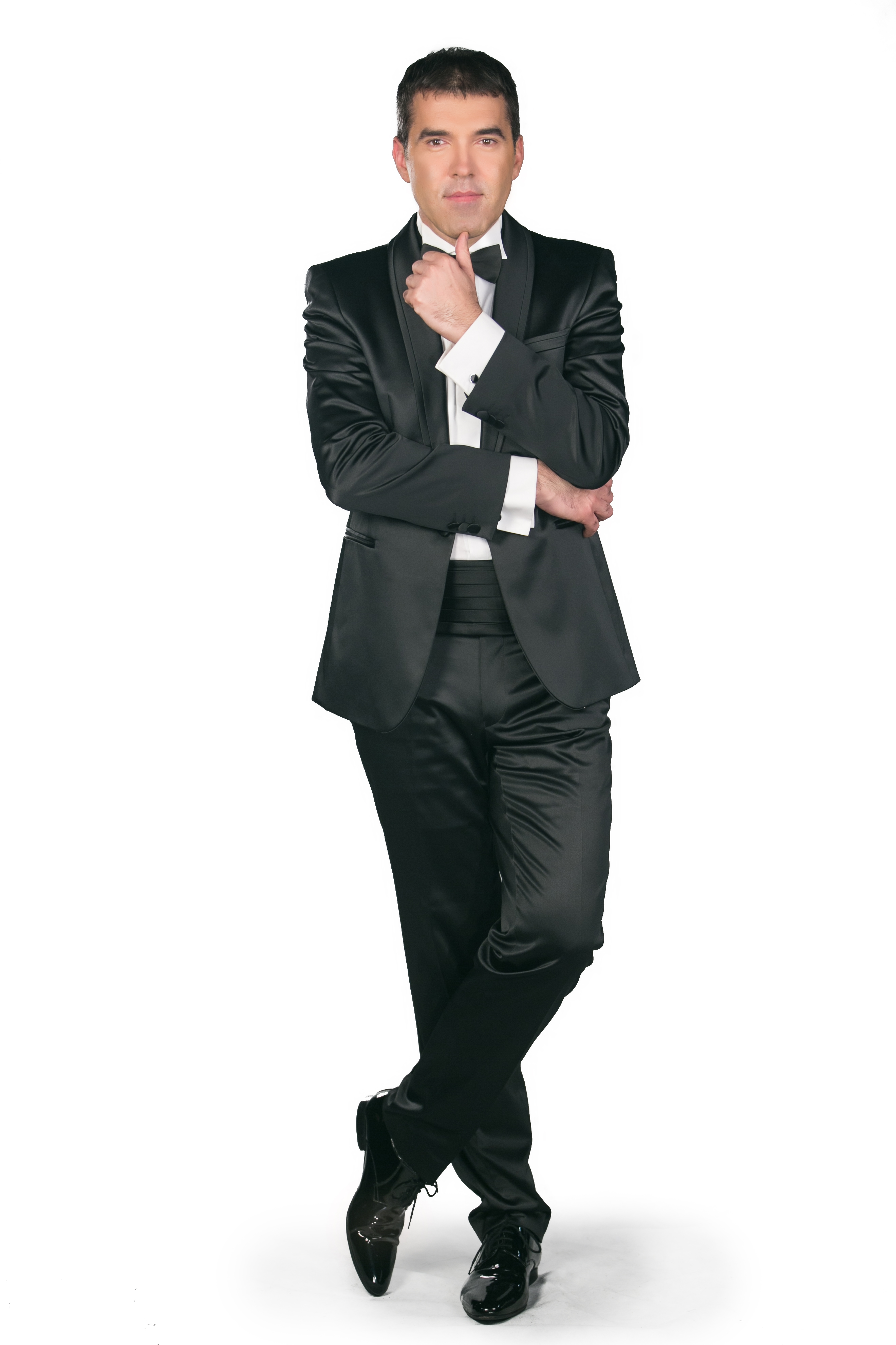 Voditelj Popevke 2016